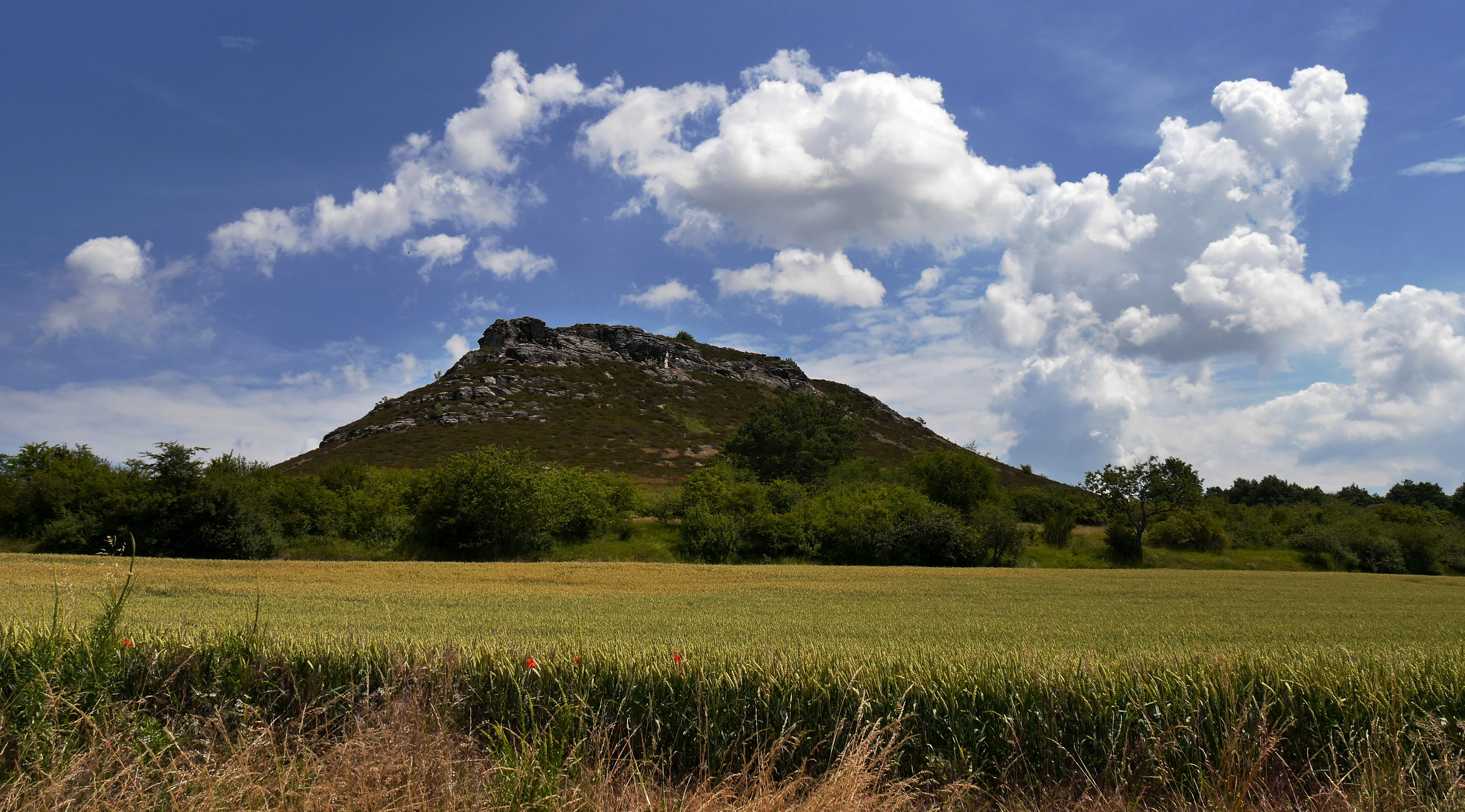 Teil der Thekenberge bei Halberstadt